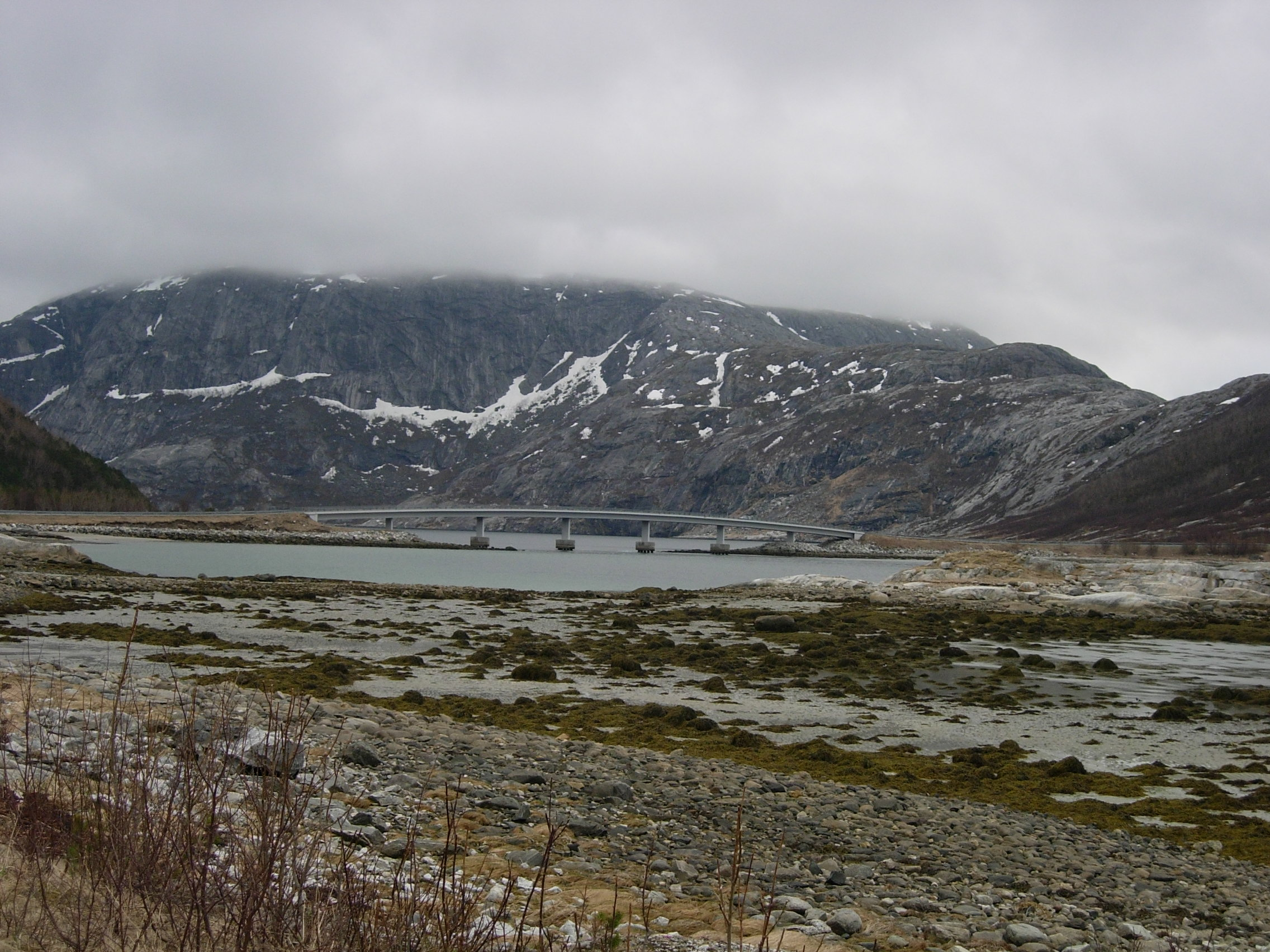 Åselistraumen bridge